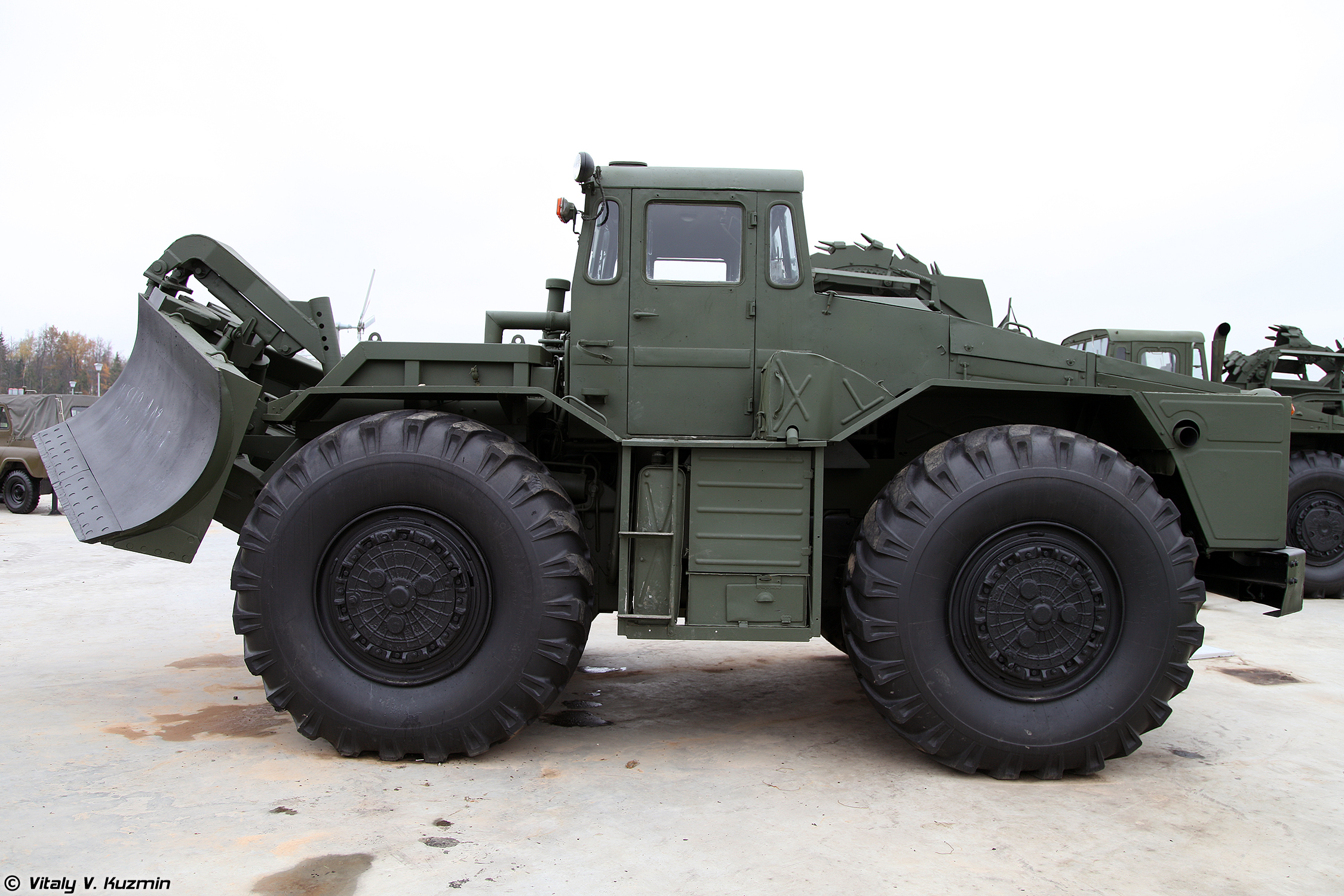 Путепрокладчик ПКТ